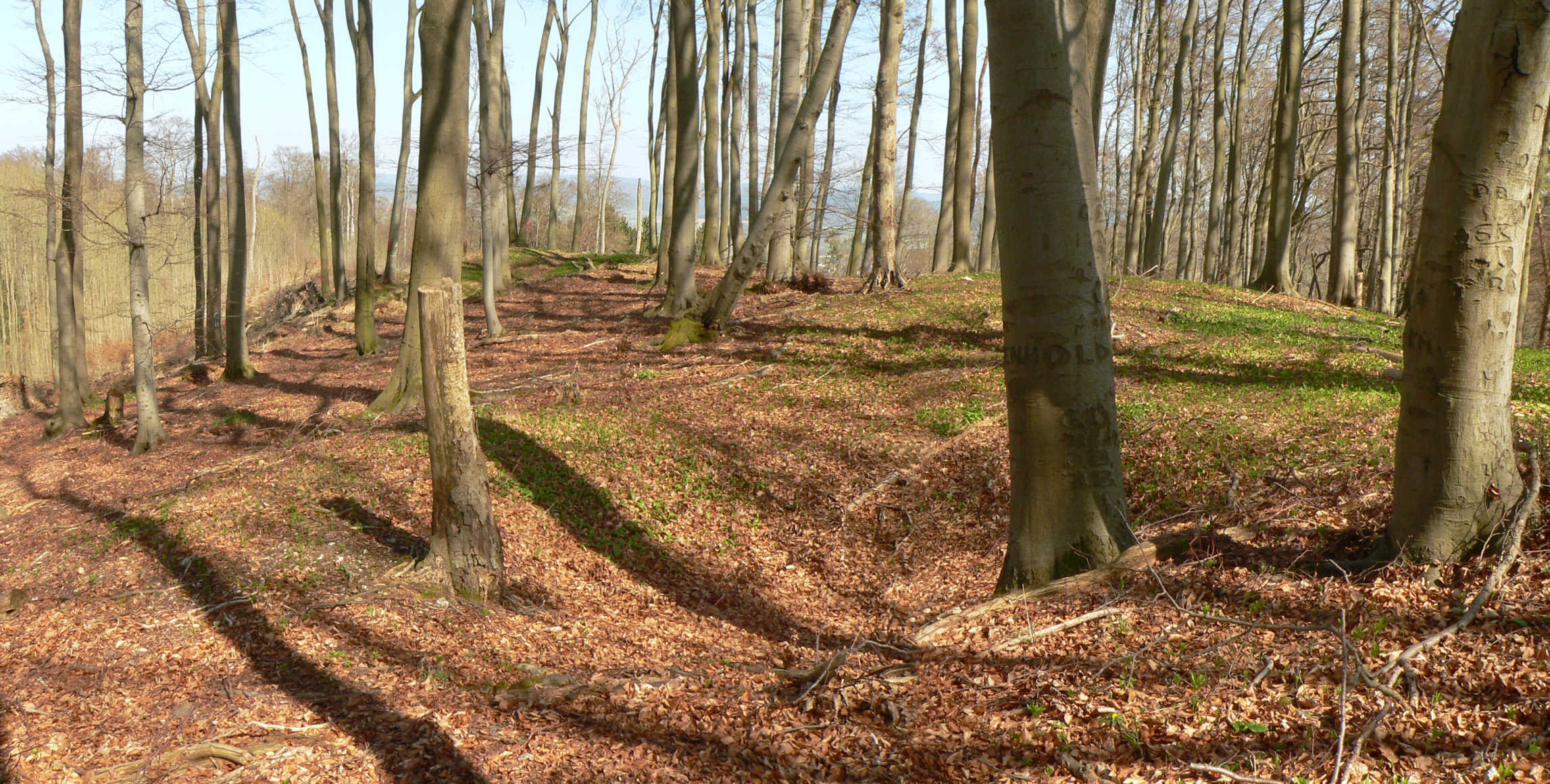 Bergkuppe des Bierbergs mit Plateau der Befestigungsanlage